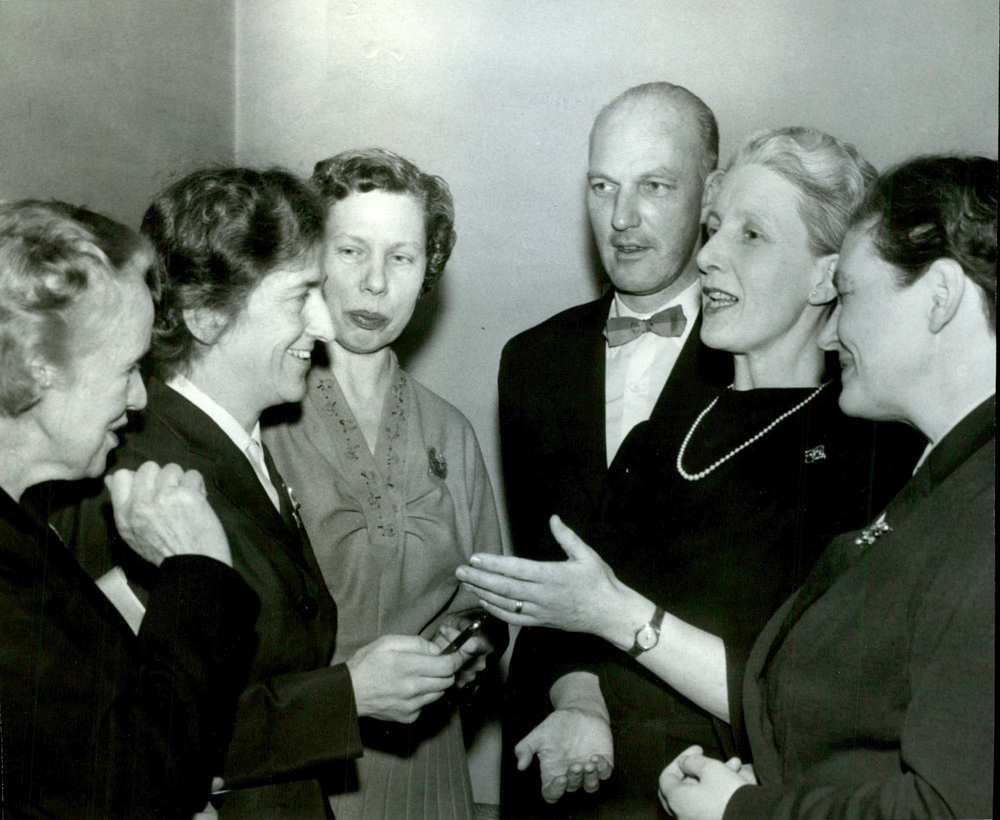 Bildtext vid publiceringen 1958: "Inför debatten om 'Kvinnligt — manligt — kyrkligt 1958' fr. v. dr Sigrid Nygren, dr Margit Sahlin, Claire Elfving, Gunnar Helander, tandläkare Margit Lindström och fru Margit Norell." Debatten ägde rum i Medborgarhusets stora sal (i Stockholm). Bilden infördes i Svenska Dagbladet 1958-01-29 sid 22 (